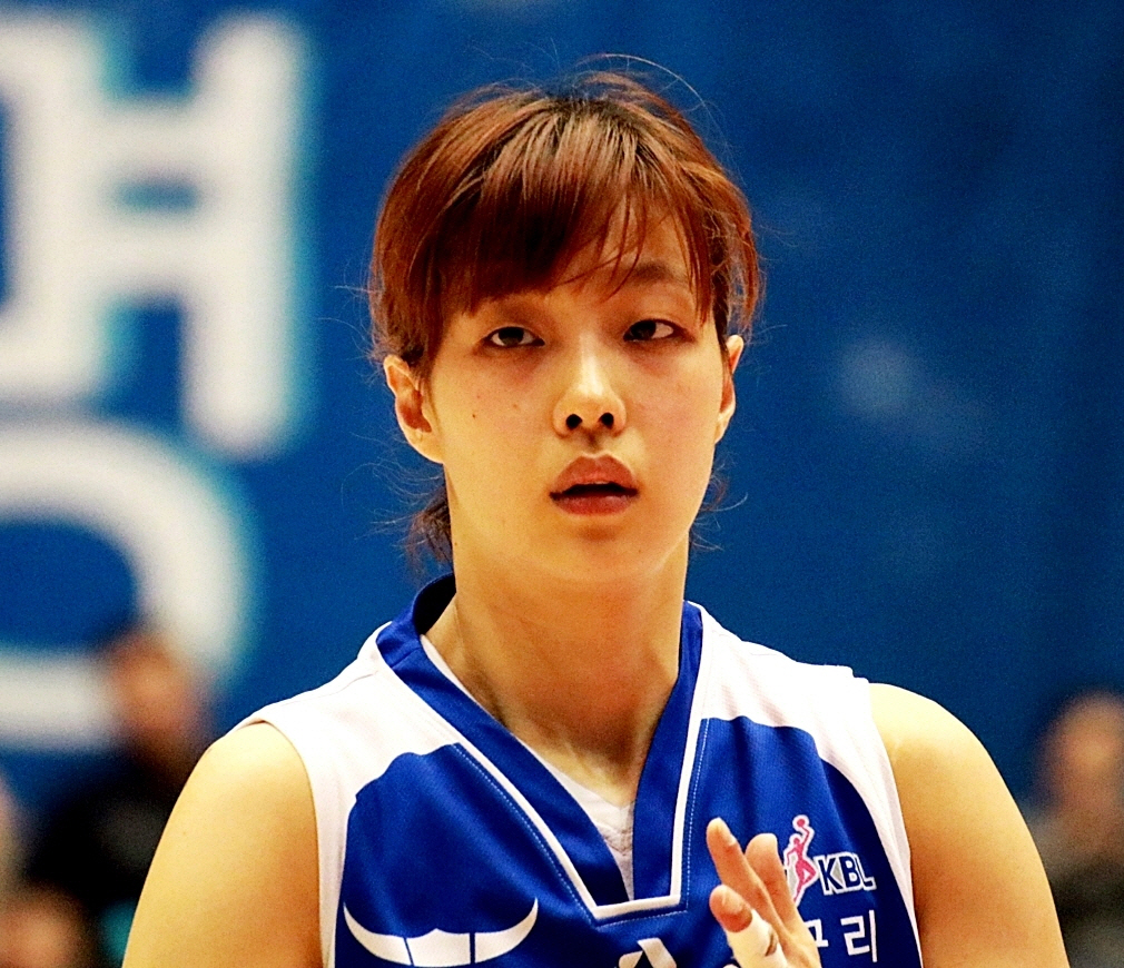 160220 여자농구 KDB생명 vs KB스타즈 직찍